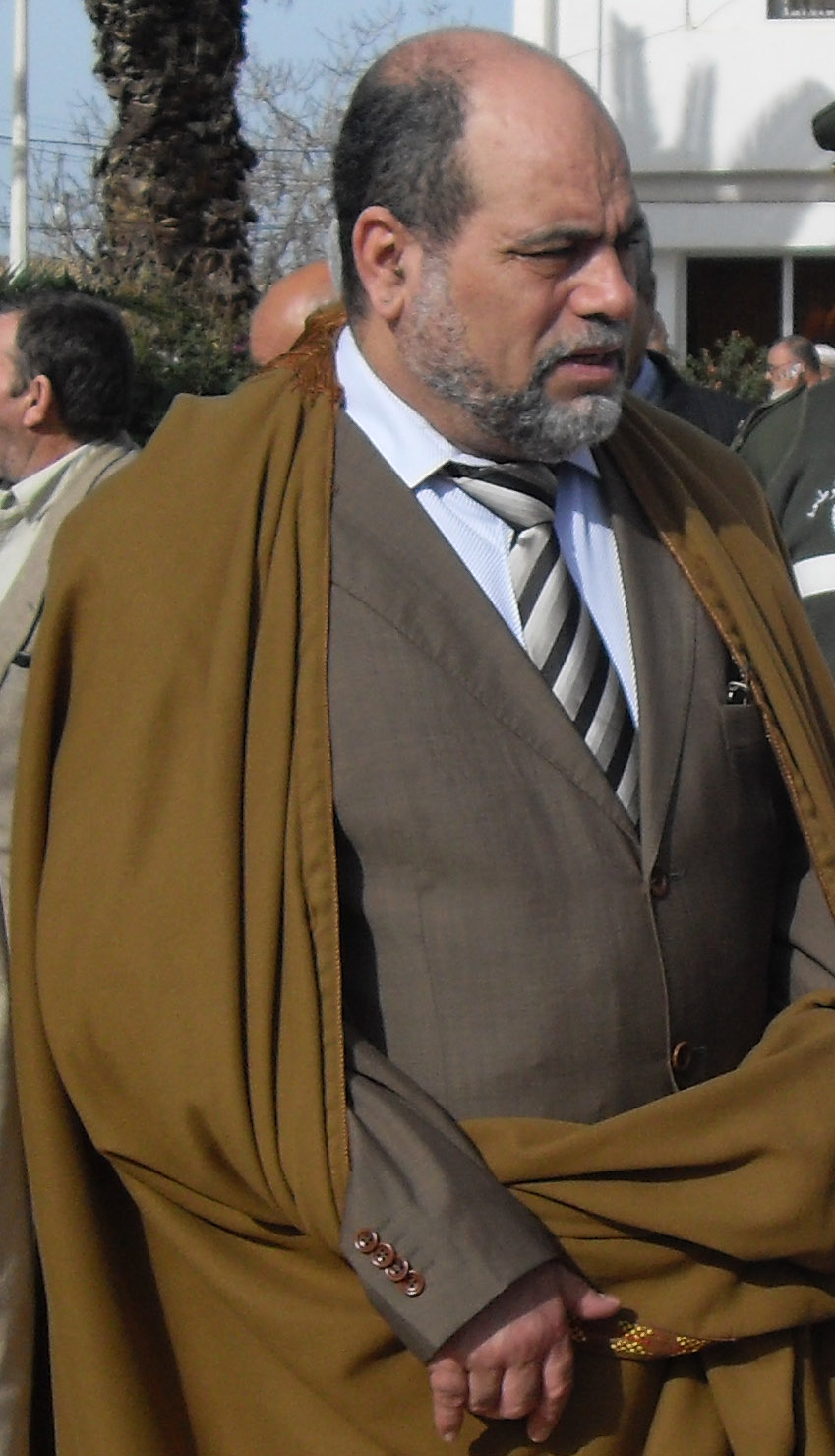 Aboudjerra Soltani à El Ghomri (Wilaya de Mascara)